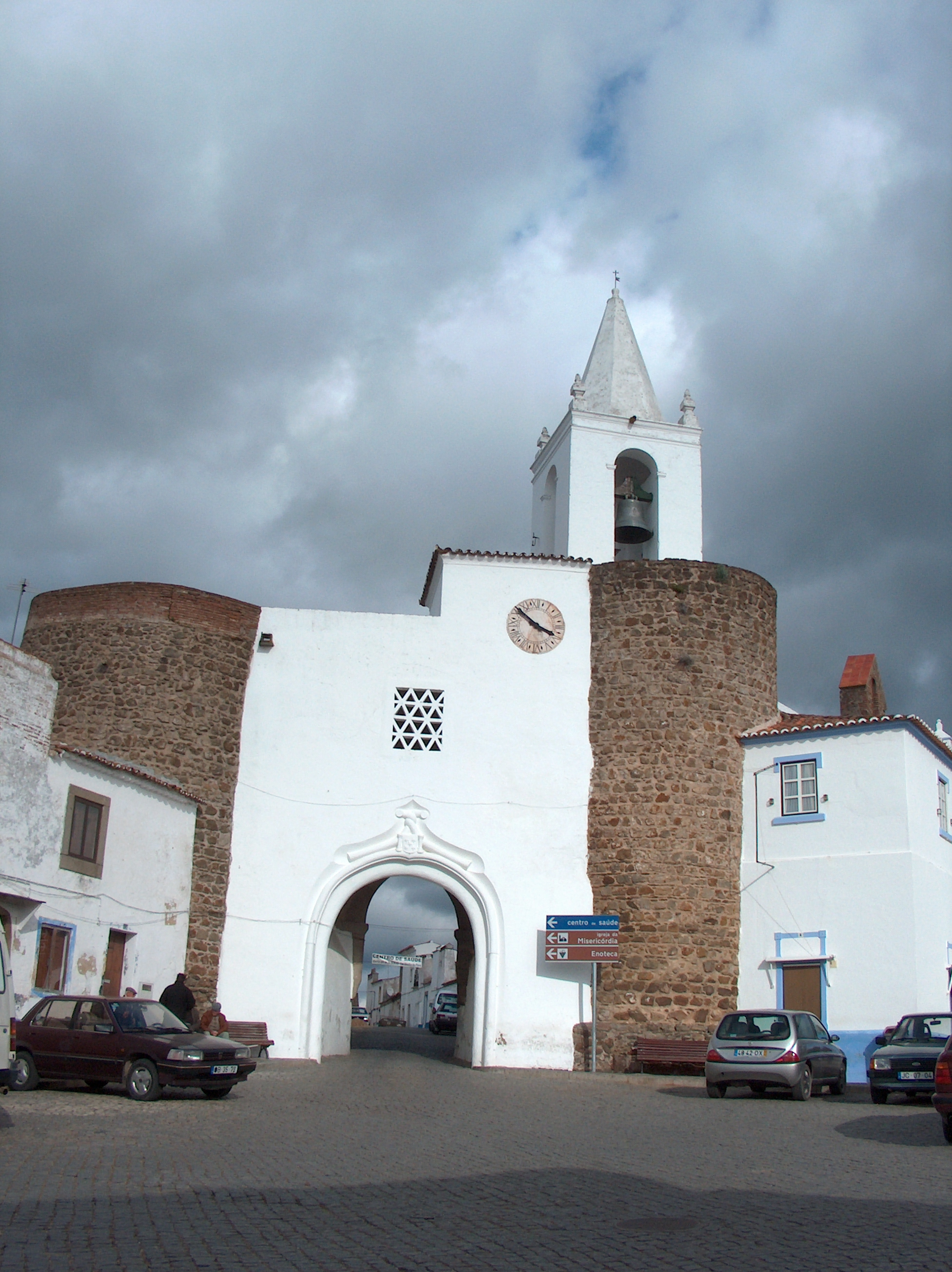 Prédio militar n.º 1, constituído por restos de muralha e torre de menagem do Castelo de Redondo